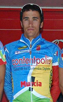 José Herrada. Contentpolis-Murcia, Euskal Bizikleta 2008